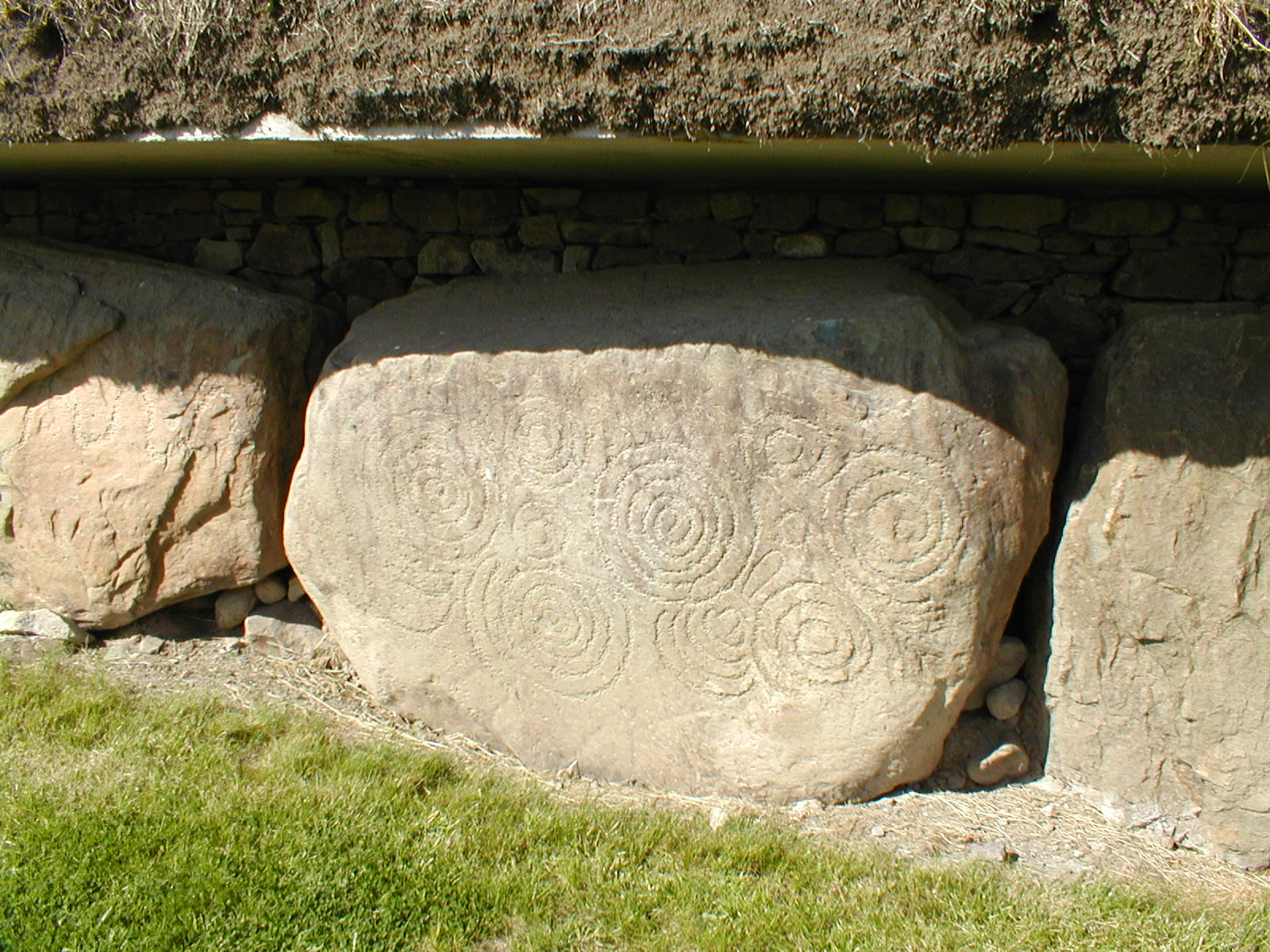 Gravierte Steine in Dowth, nahe Newgrange